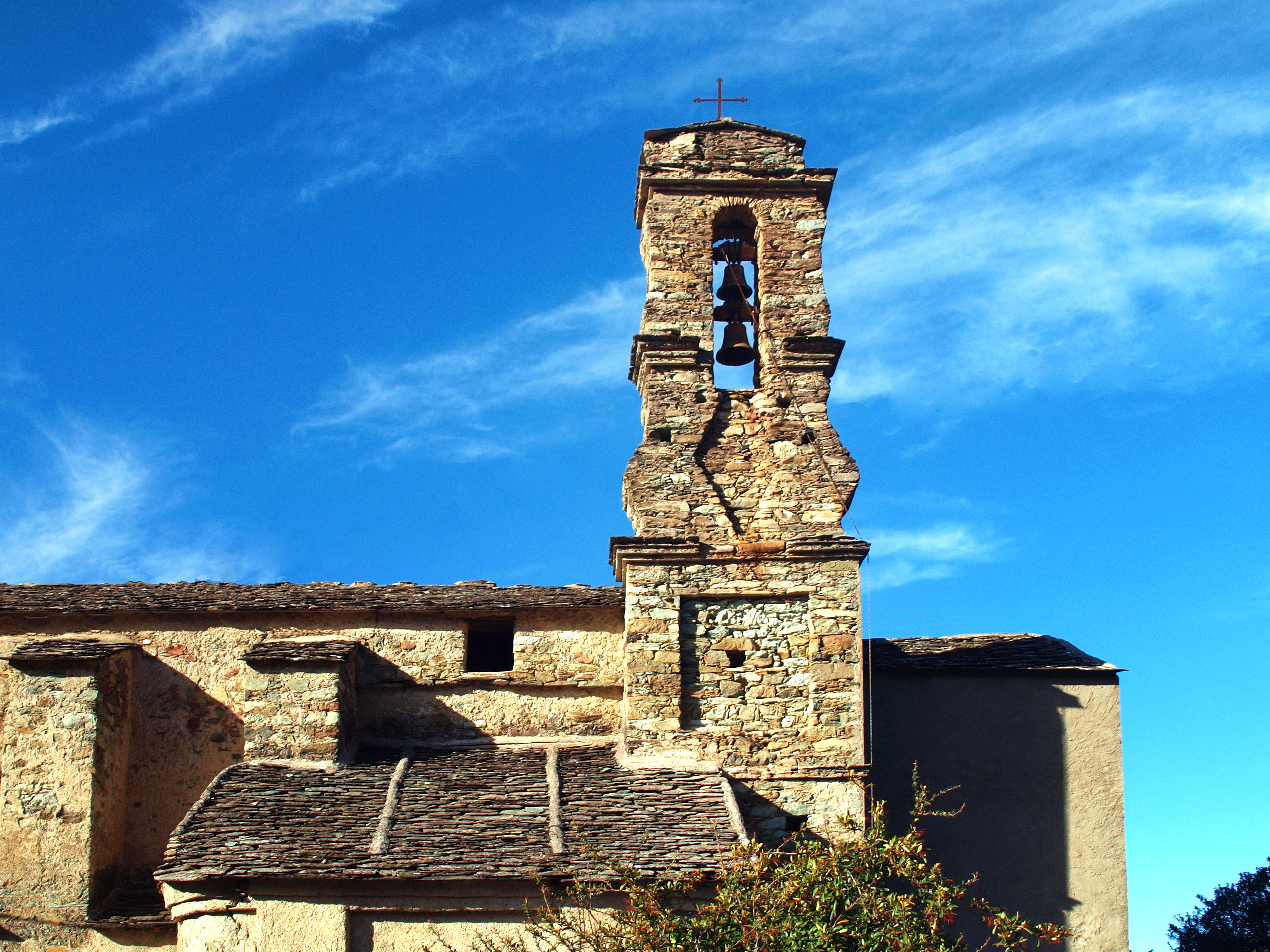 Gavignano, Castagniccia (Haute-Corse) - Clocher de l'église paroissiale de l'Annonciation